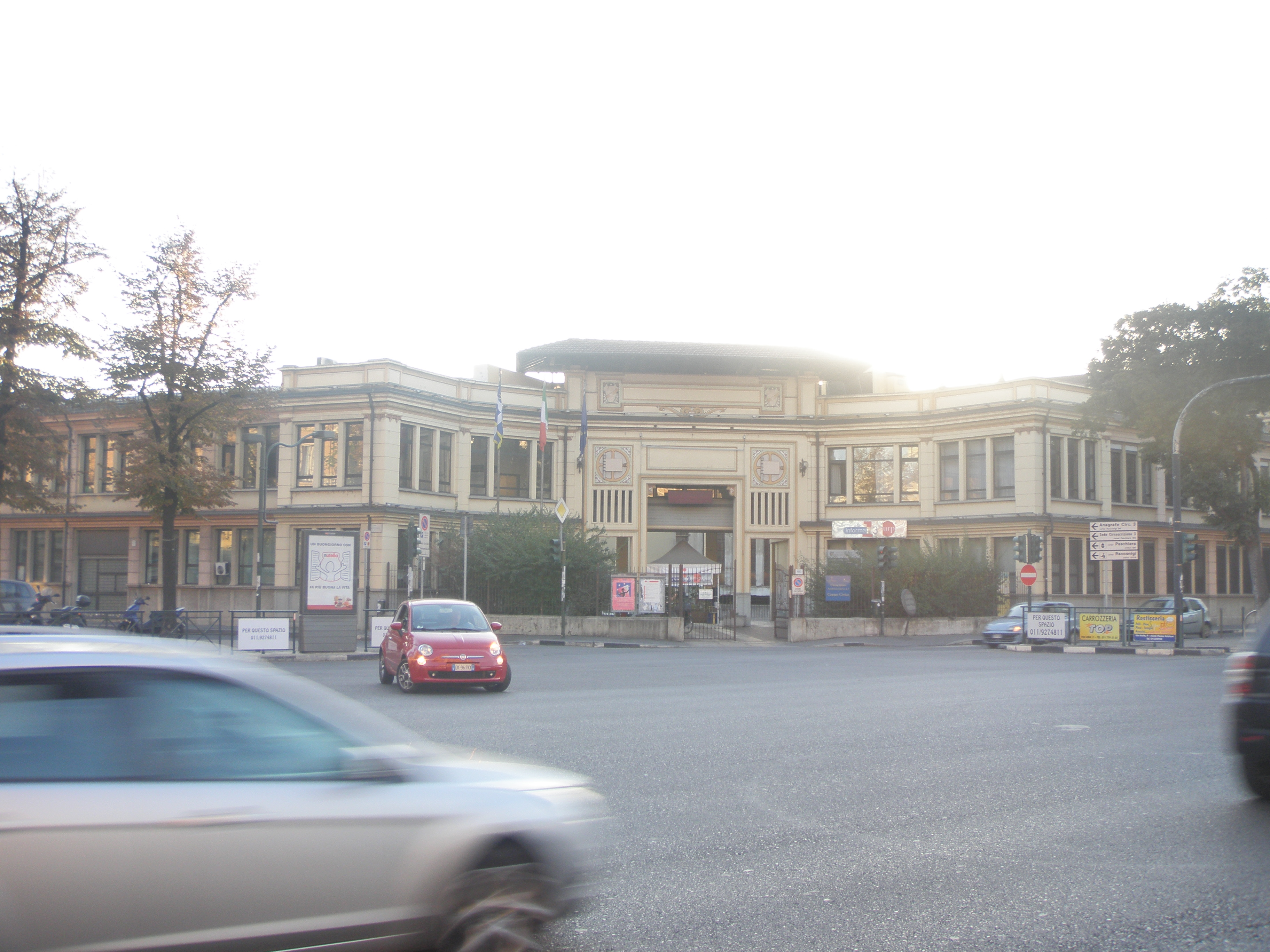 Antigua Sede de Lancia